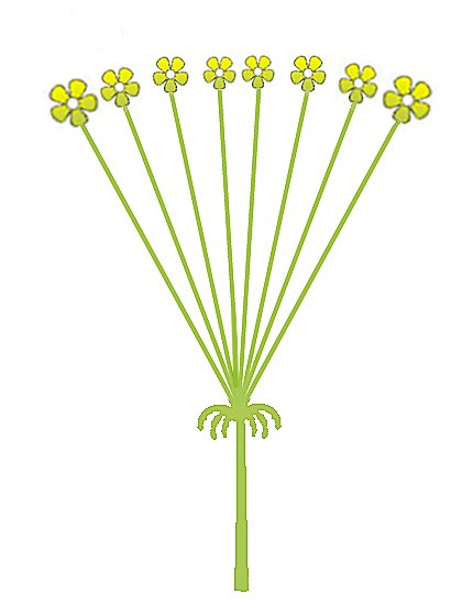 (scherm) Umbel